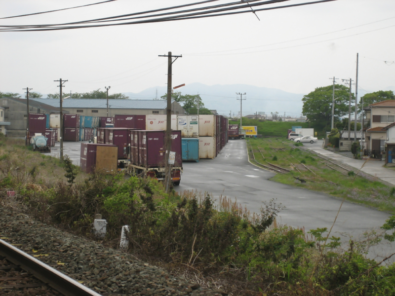 豊橋オフレールステーションを船町駅から遠望